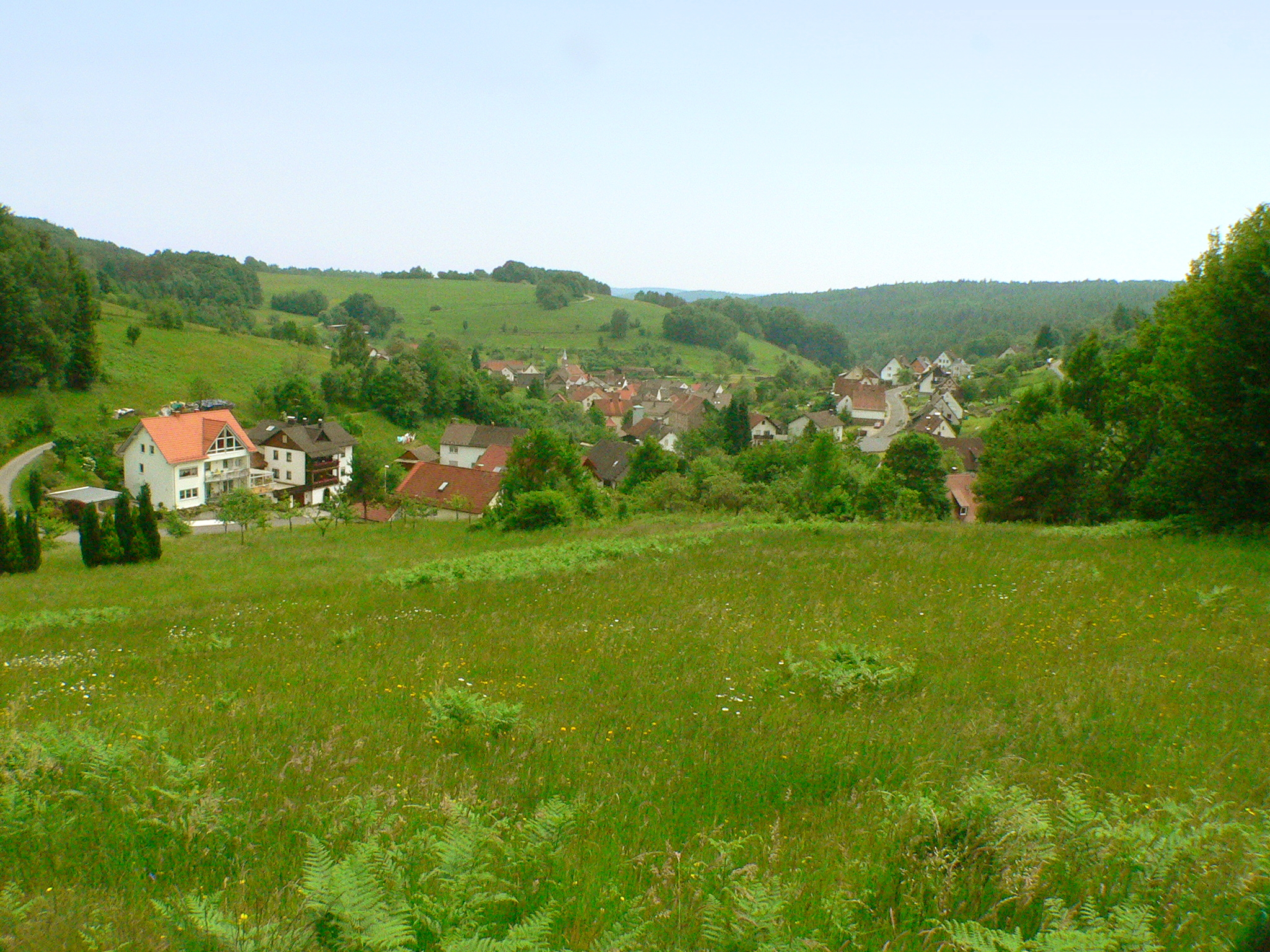 Jakobsthal im Spessart, Deutschland